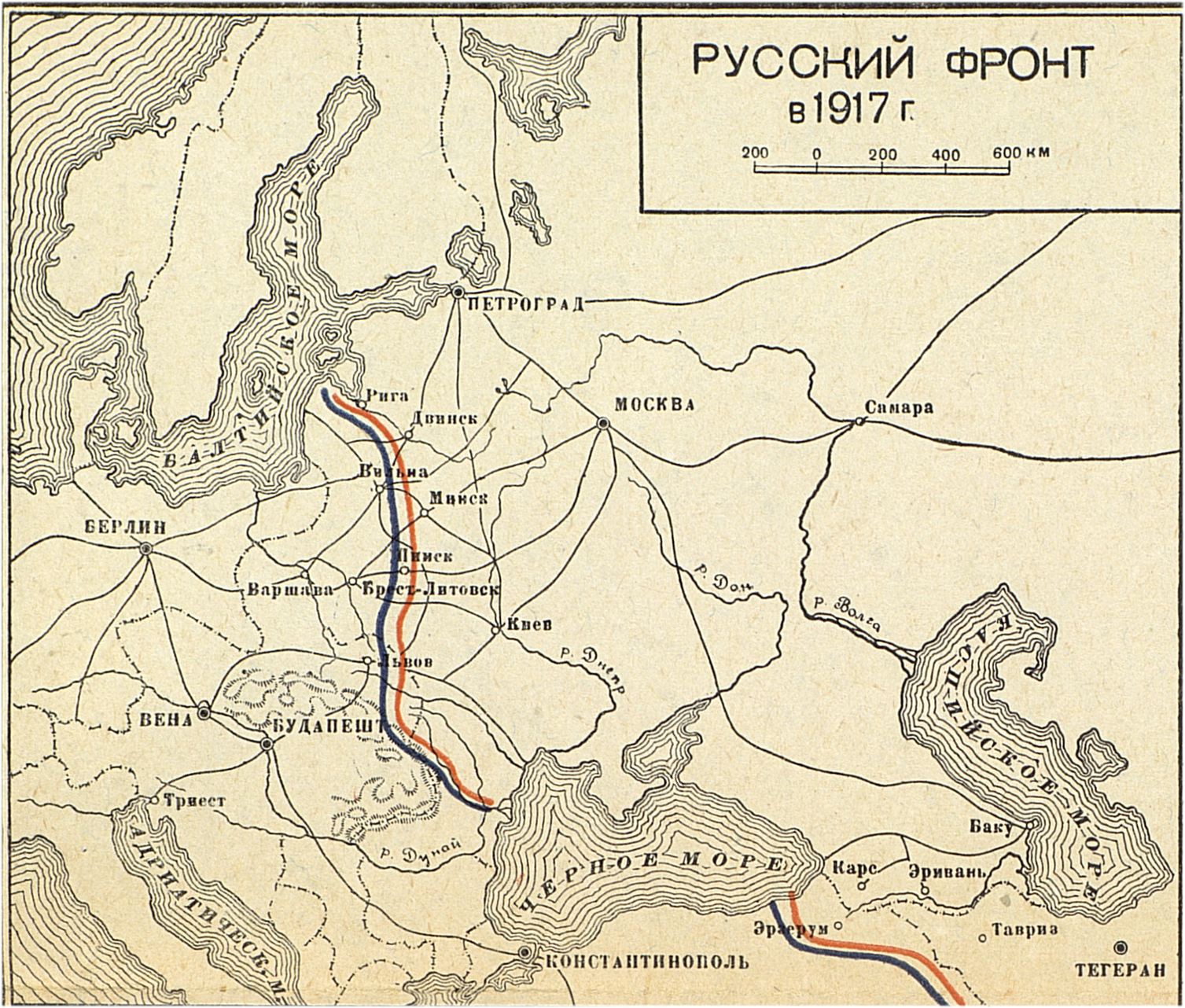 Лист №55. Кампания 1917 года. Русский театр. А. Наступление и отход юго-западного фронта. Русский фронт.